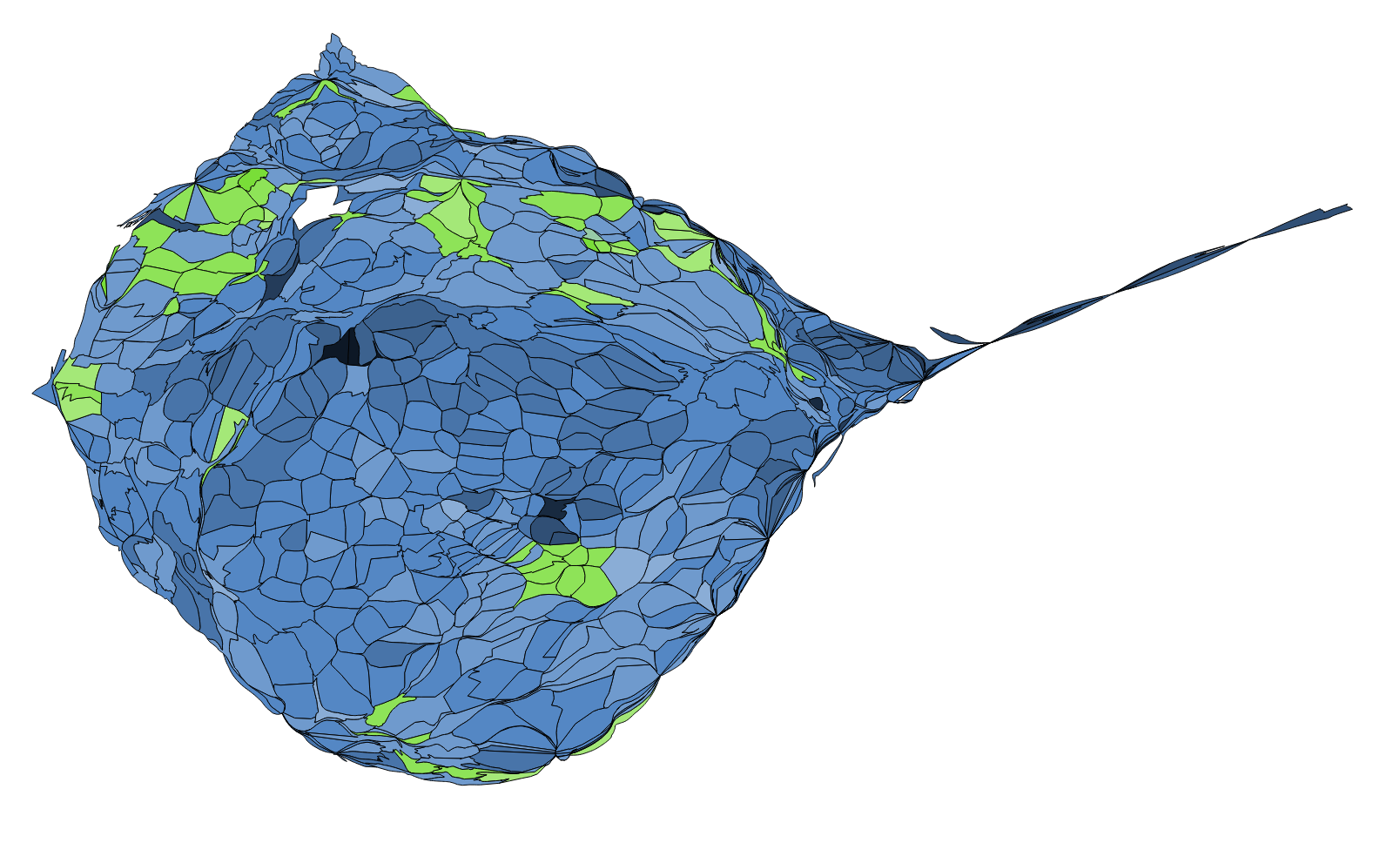 2018 台中市市長選舉各里得票人口變形圖